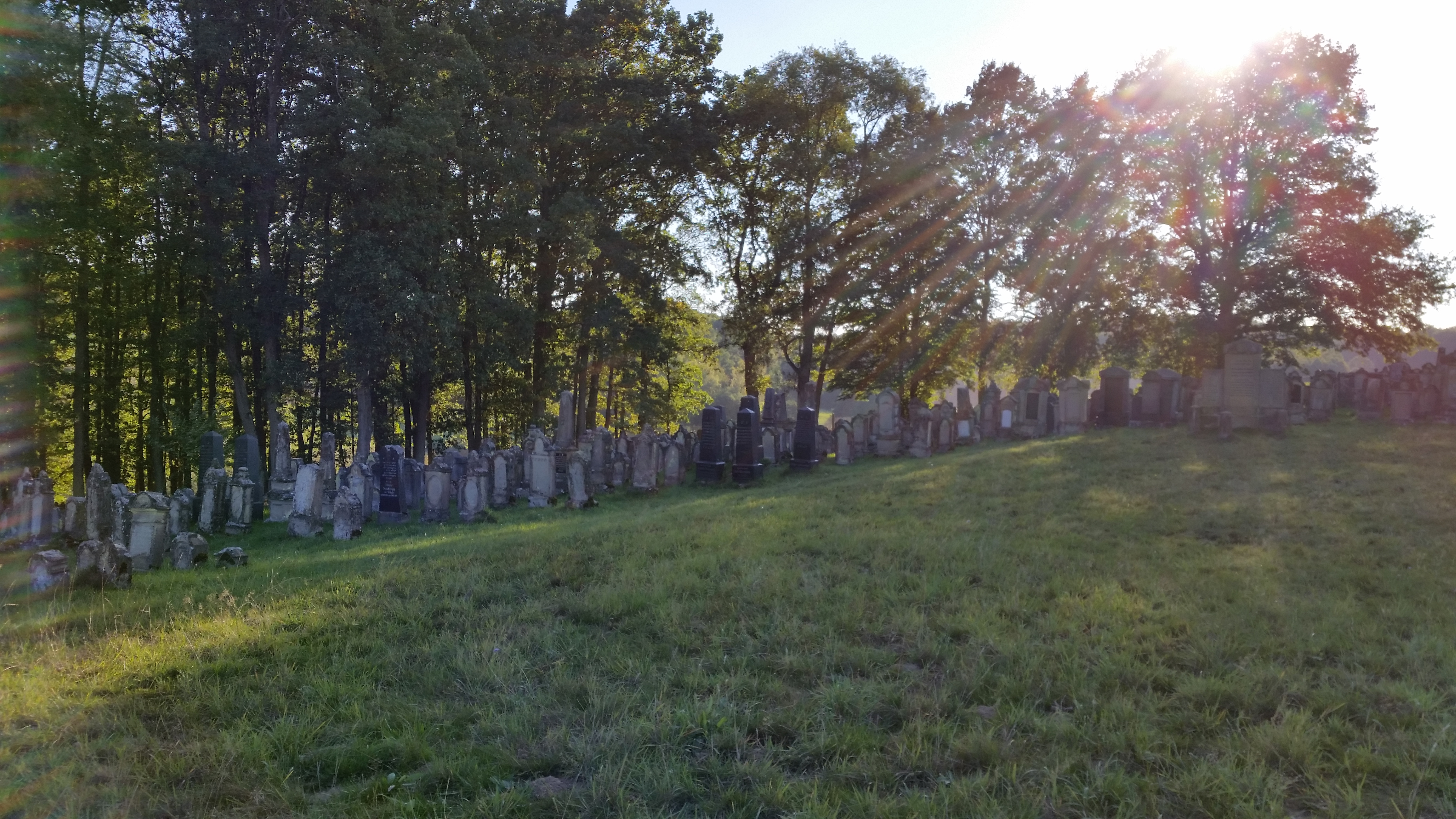 Bild vom jüdischen Friedhof bei Kleinsteinach im Sonnenuntergang